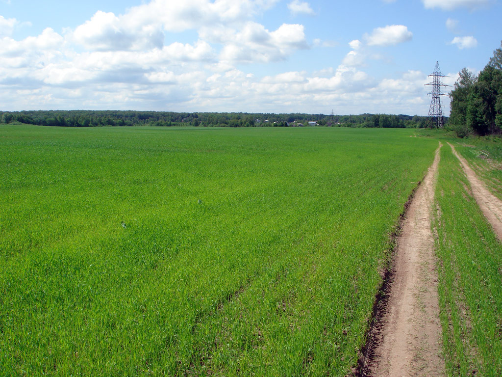 Поле близ деревни Крутая.